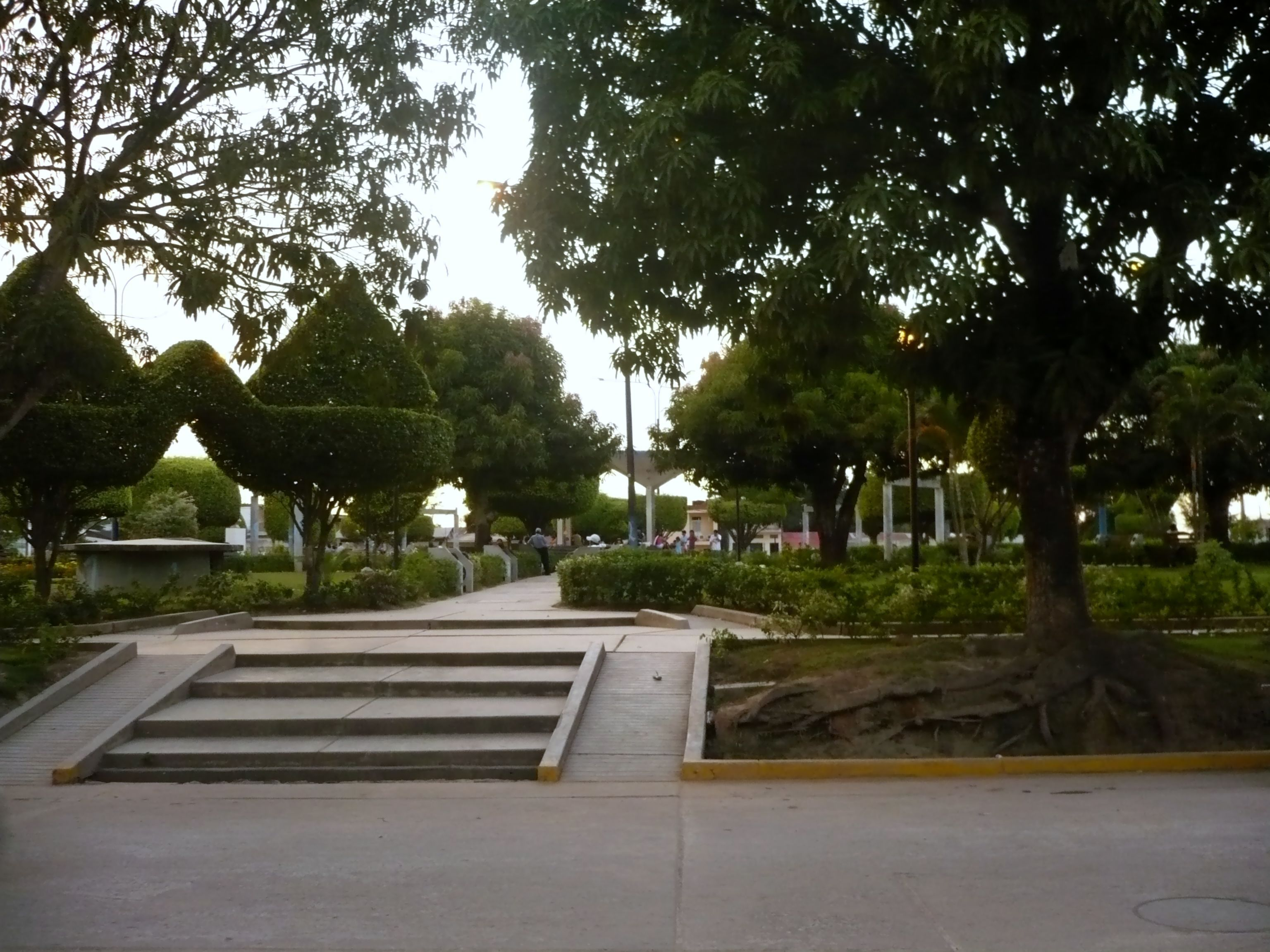 Plaza de armas del distrito de Yarinacocha, Pucallpa.